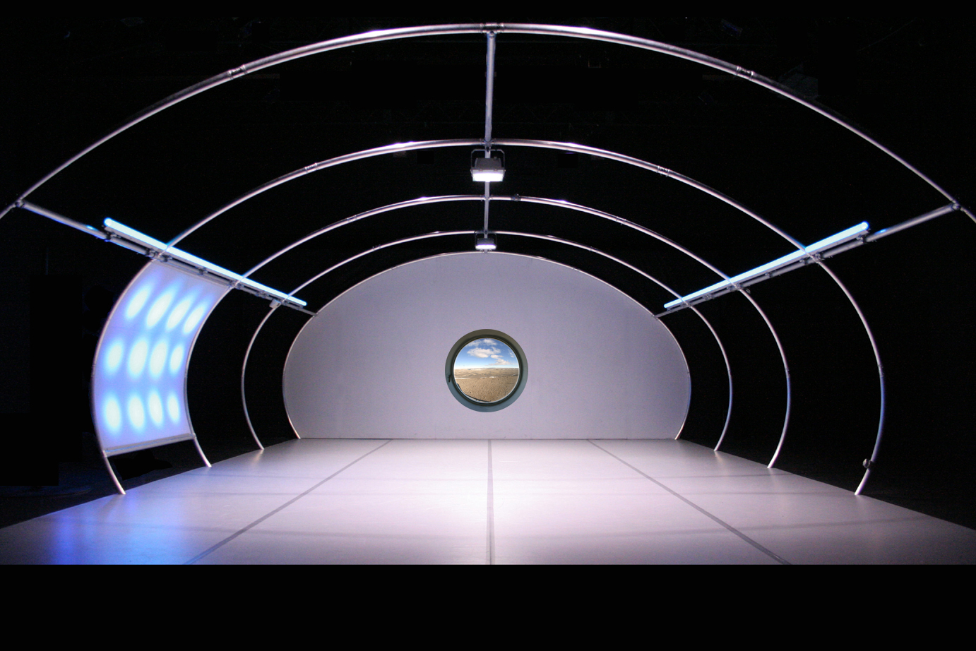 décors (conception François Lopez) du spectacle Idiots Mais Rusés de la compagnie de danse contemporaine LES GENS DU QUAI.